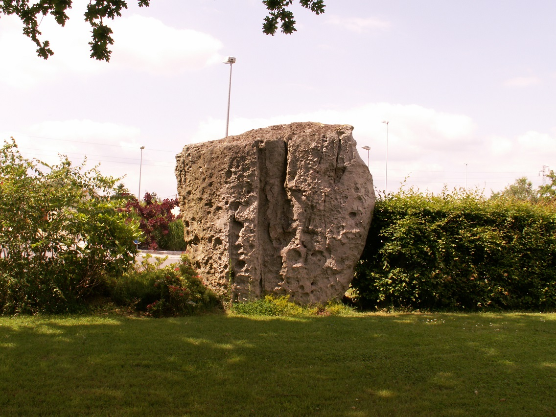 Menhir de Pierre Frite